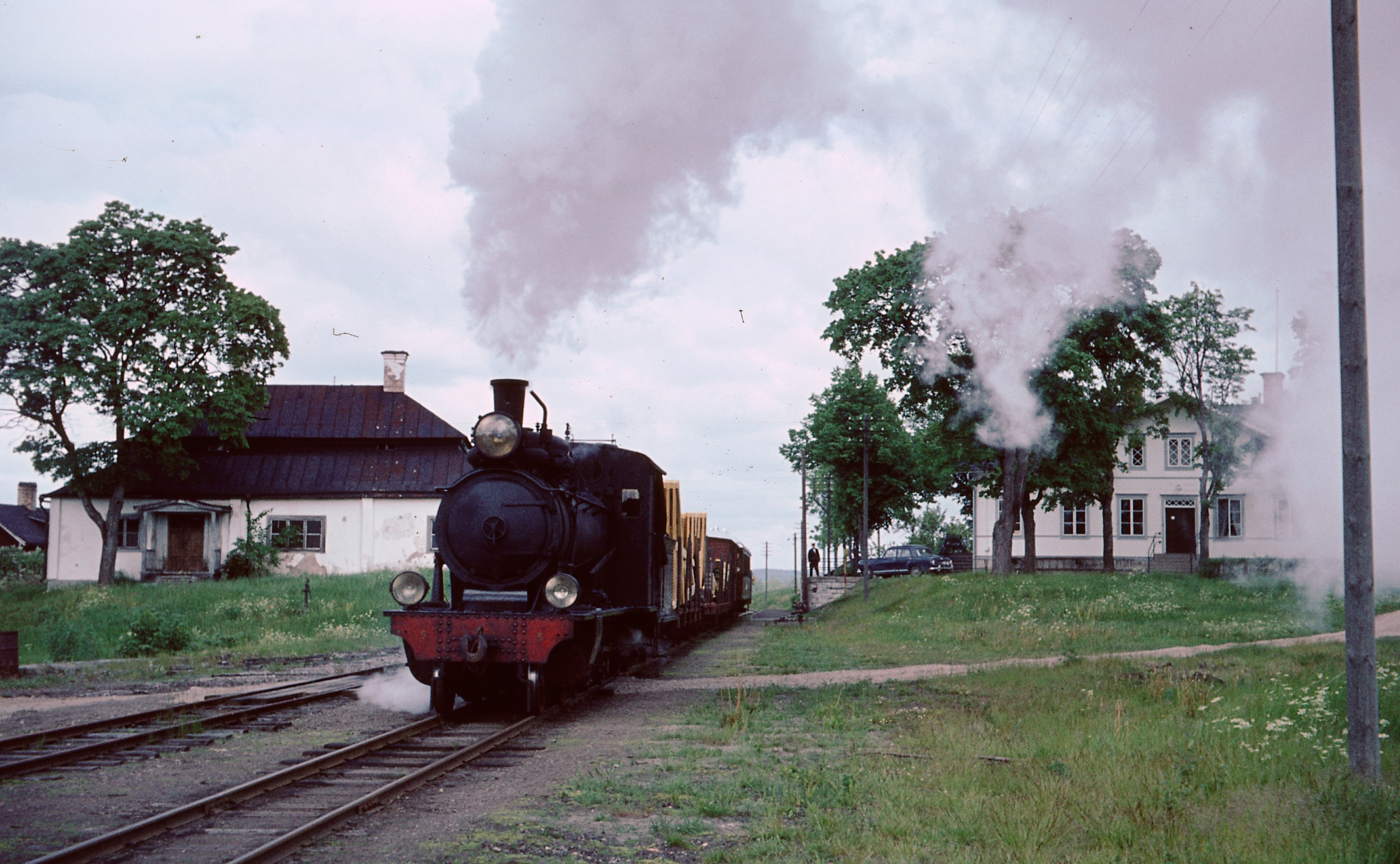 Tåg draget av BLJ 5 "Thor" vid Stjärnsunds station. BLJ 5 är bevarat vid Museiföreningen Stockholm-Roslagens Järnvägar (SRJmf) och används i museitrafik på Upsala-Lenna Järnväg.